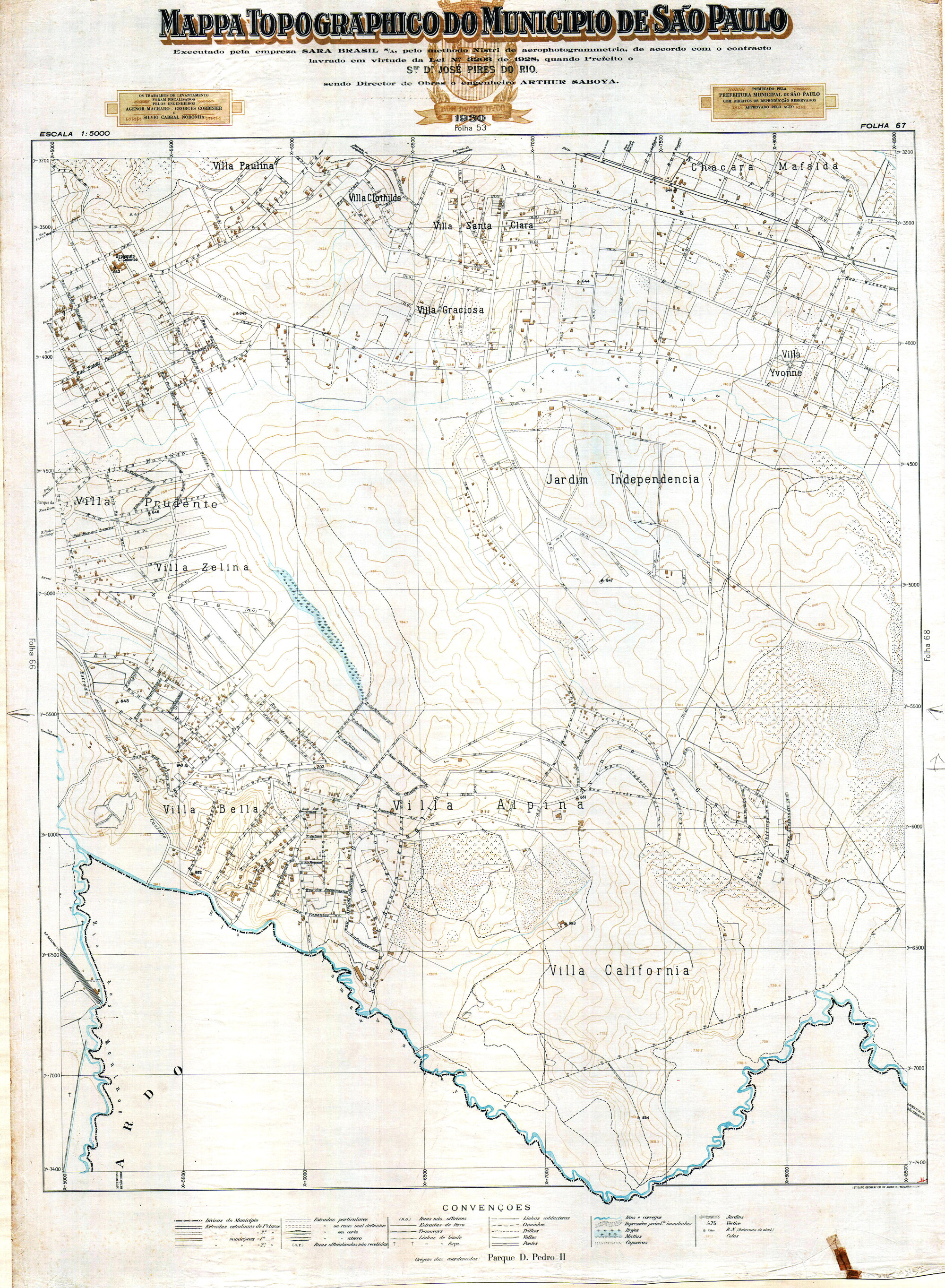 Setor 67 do Mapa topográfico do município de São Paulo, executado pela empresa SARA Brasil S/A, pelo método Nistri de aerofotogrametria de acordo com o contrato lavrado em virtude da Lei nº 3203 de 1928, quando Prefeito o Sr. Dr. José Pires do Rio, sendo Diretor de Obras o engenheiro Arthur Saboya.